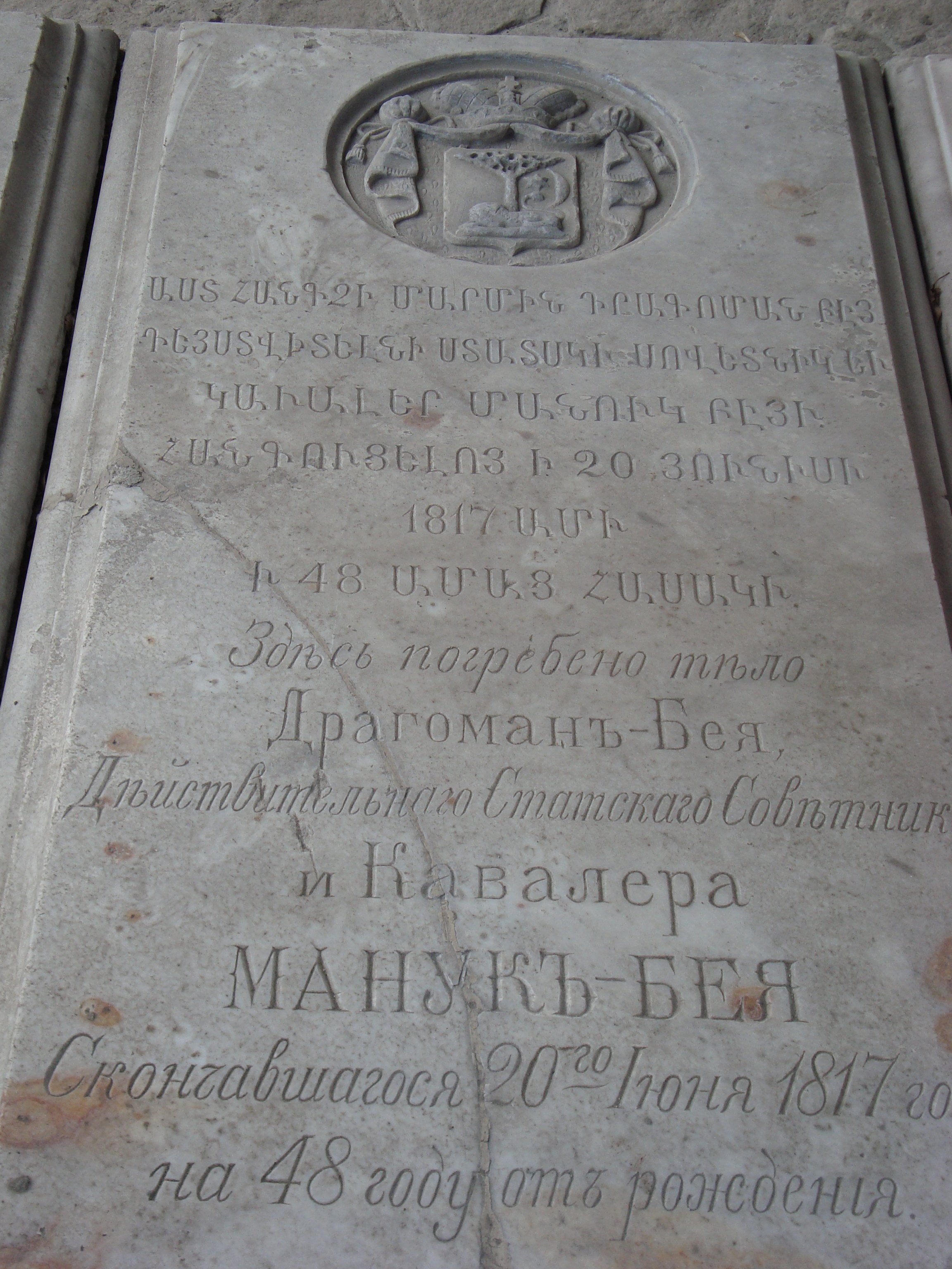 Piatra funerara de pe mormantul lui Manuc bei din Chisinau